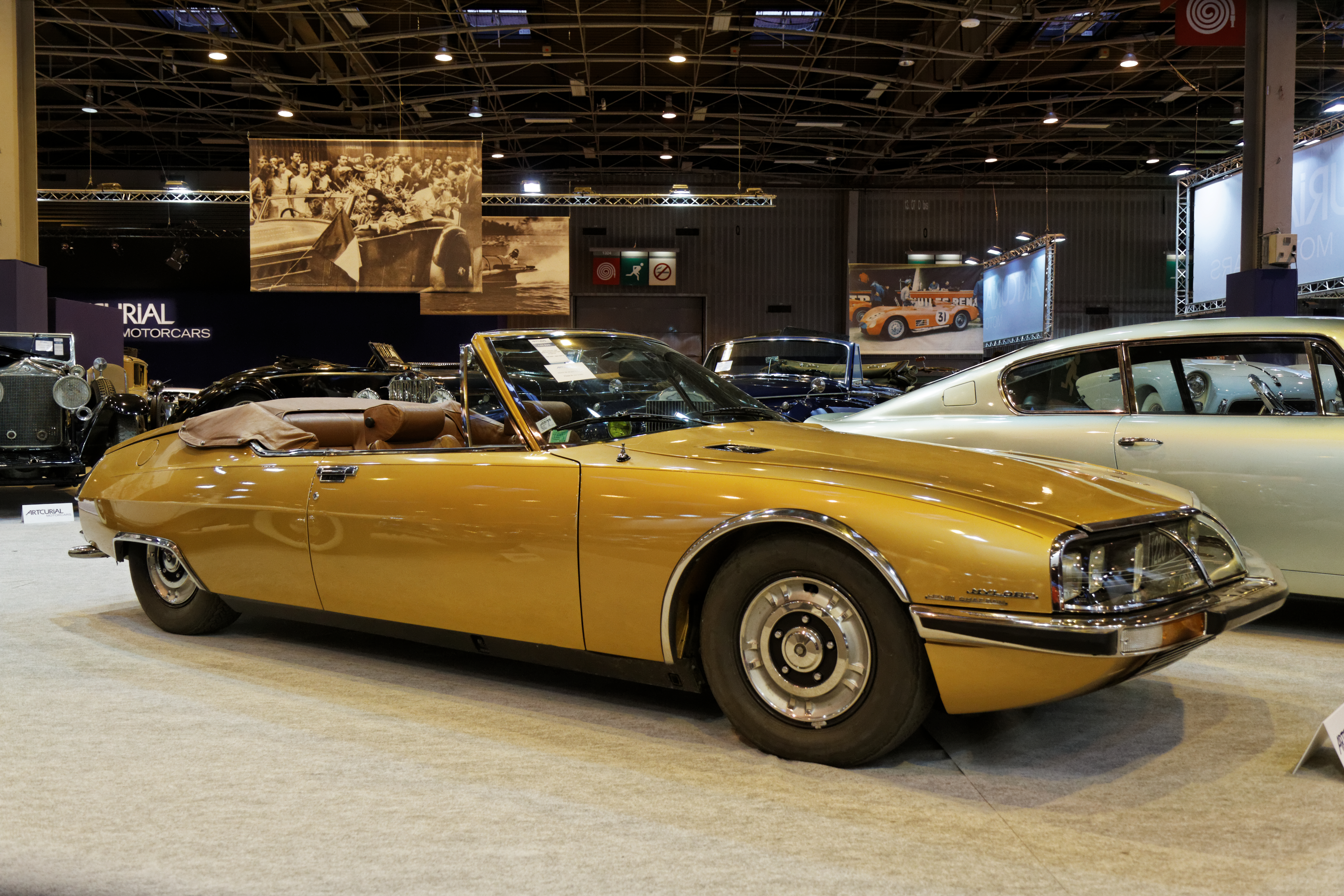 Une Citroën SM Mylord Cabriolet Chapron exposée lors du salon Retromobile 2014